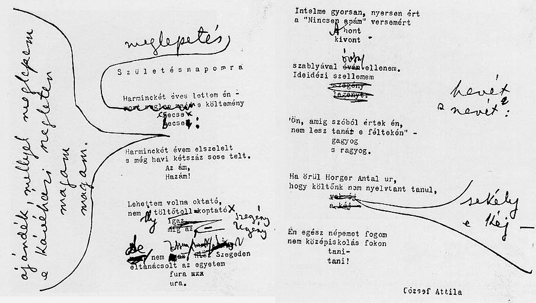 József Attila Születésnapomra című versének kézirata